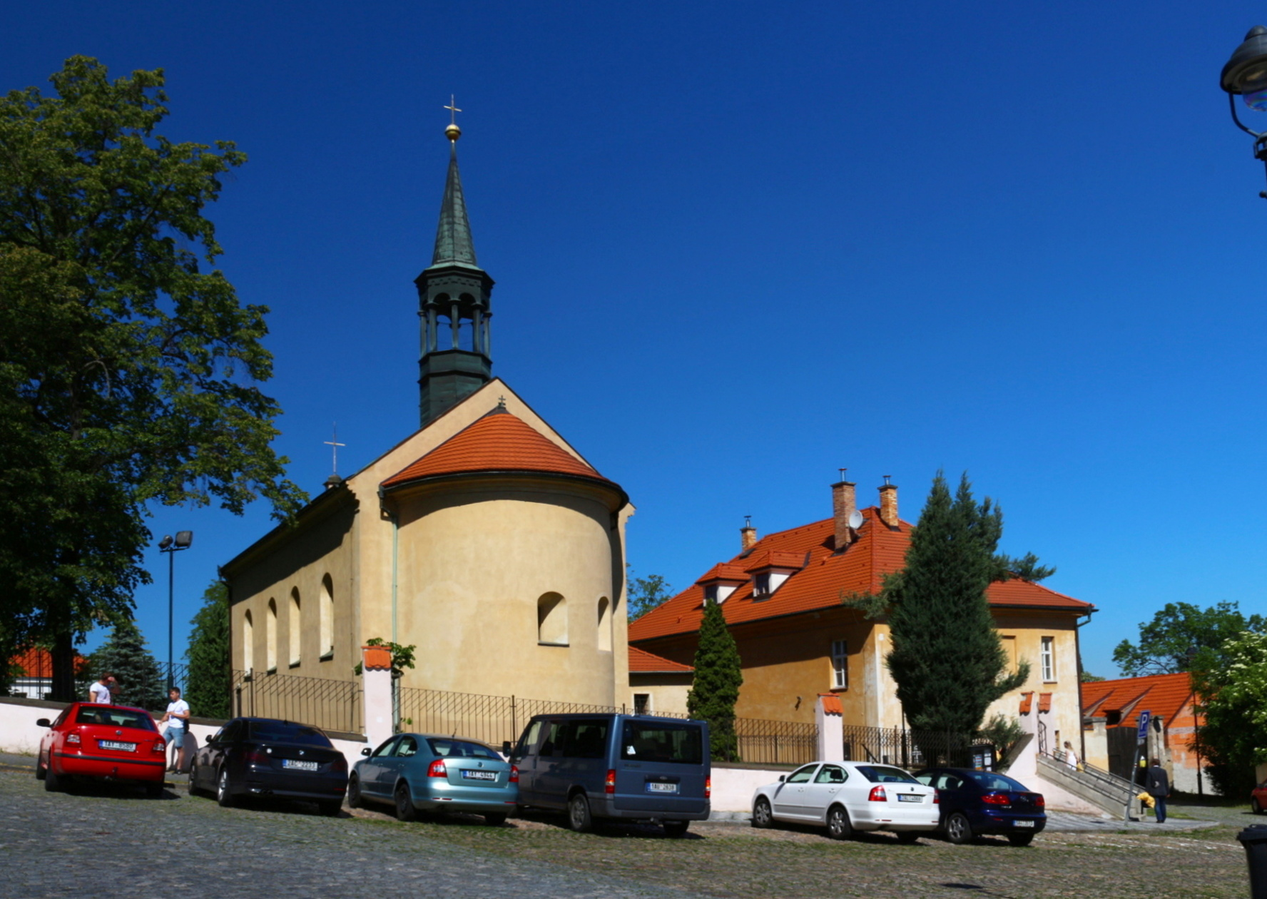 Hostivařský kostel Stětí sv. Jana